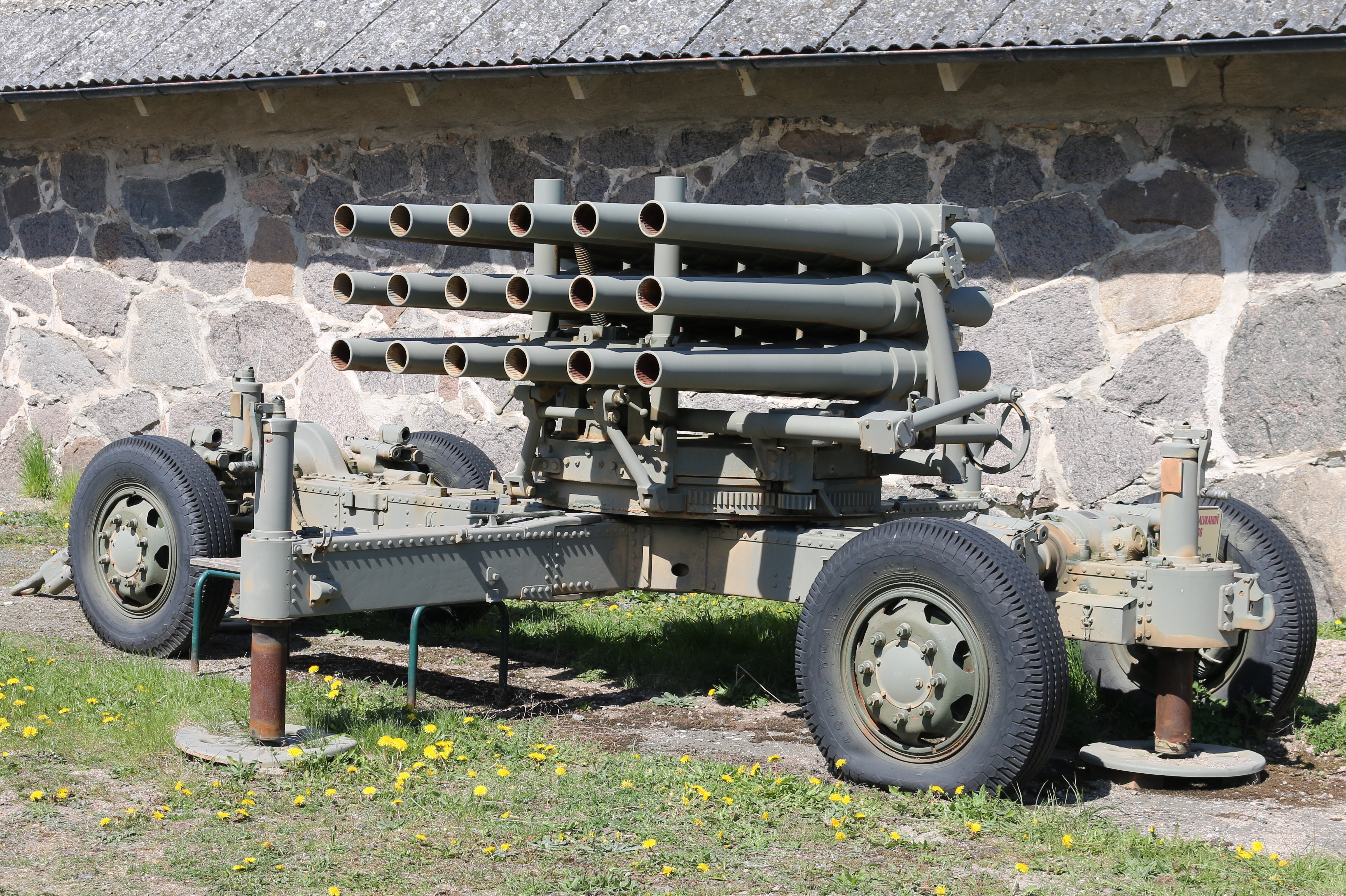 10,5 cm salvkanon M 1946 Artillerimuseet 2017